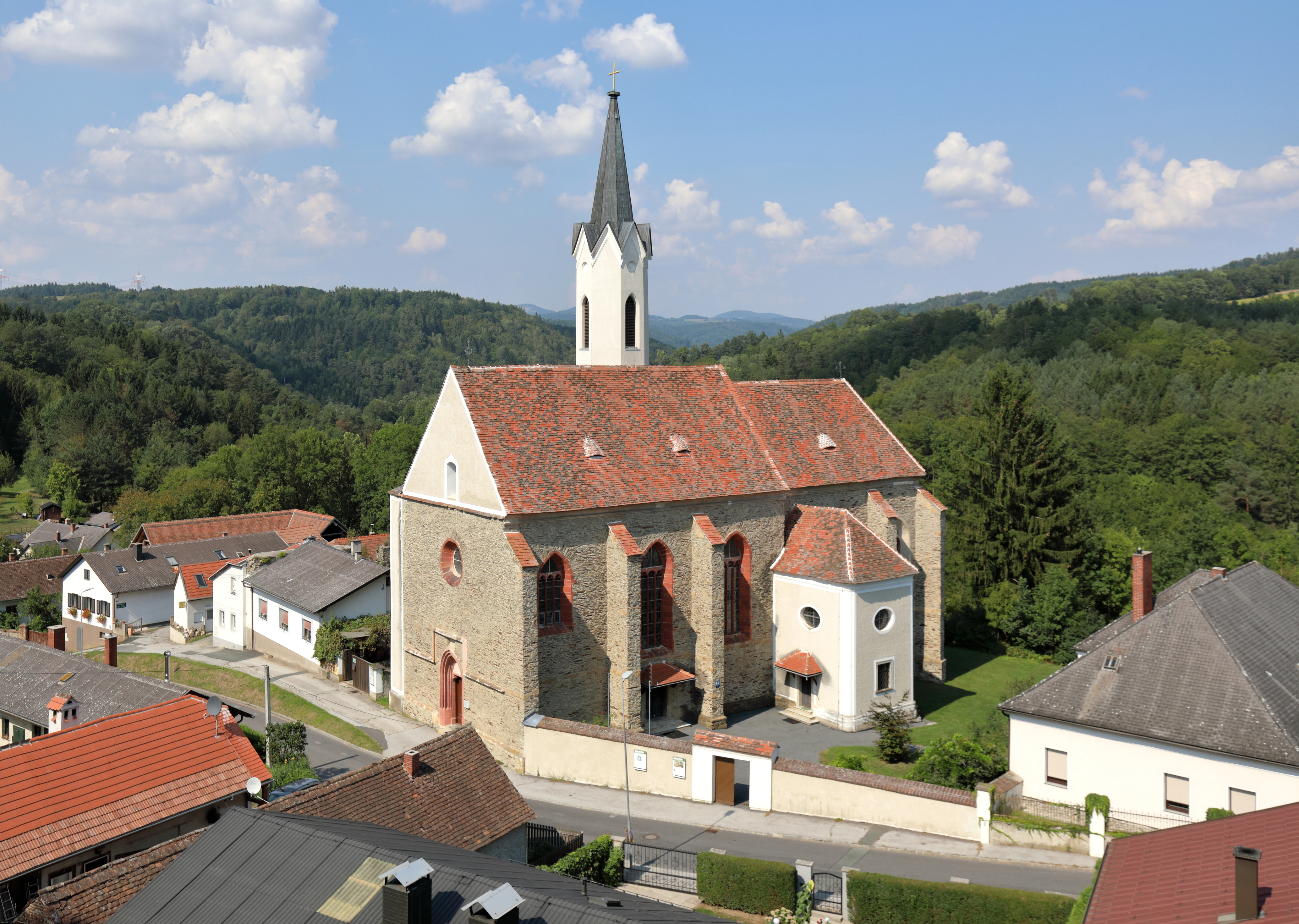 Südansicht der röm.-kath. Pfarrkirche hl. Josef in der burgenländischen Stadtgemeinde Stadtschlaining.Die Kirche ist der erhaltene Teil, der von Andreas Baumkirchner um 1460 errichteten Pauliner-Klosteranlage. Der dreigeschossige schlanke Turm mit Spitzhelm stammt aus der Mitte des 19. Jahrhunderts.